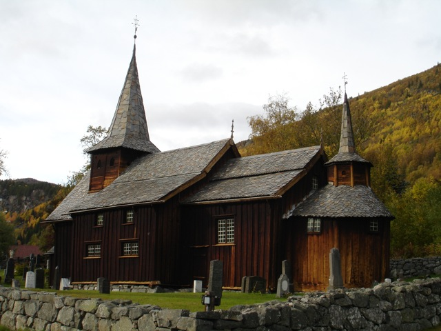 Bilete Hol gamle kyrkje